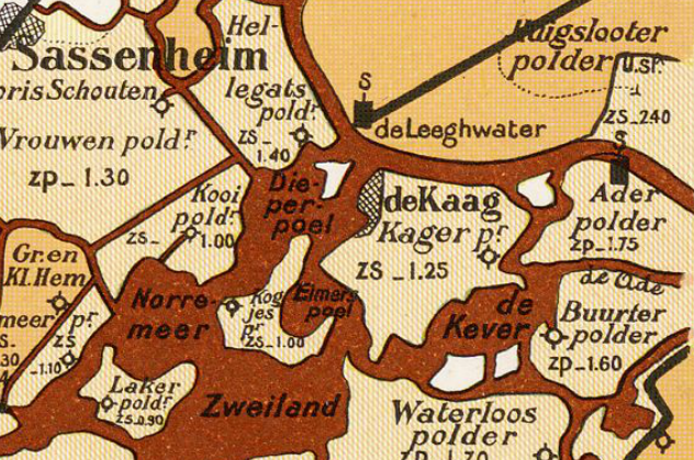 Kagerpolder